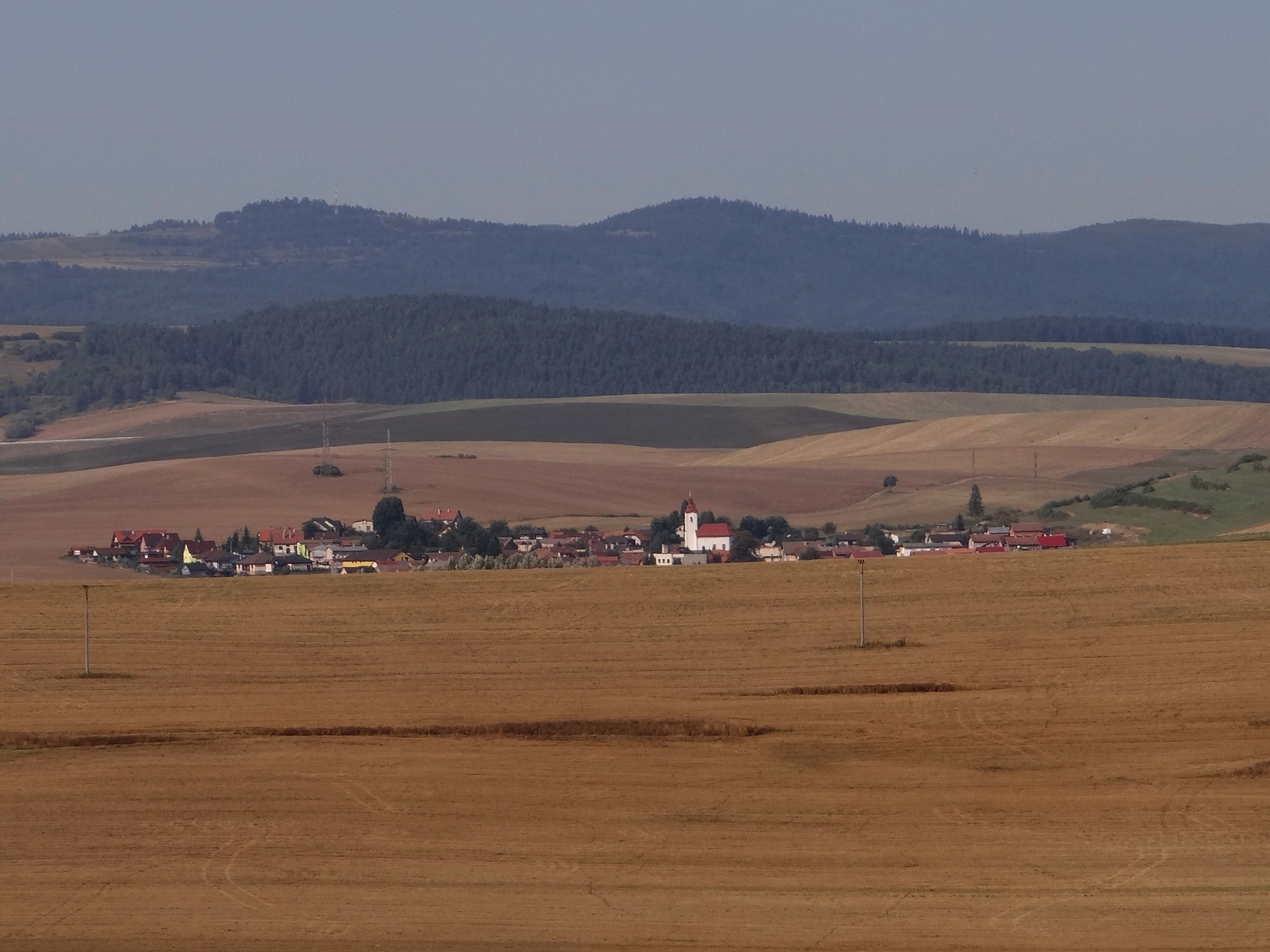 Arnutovce